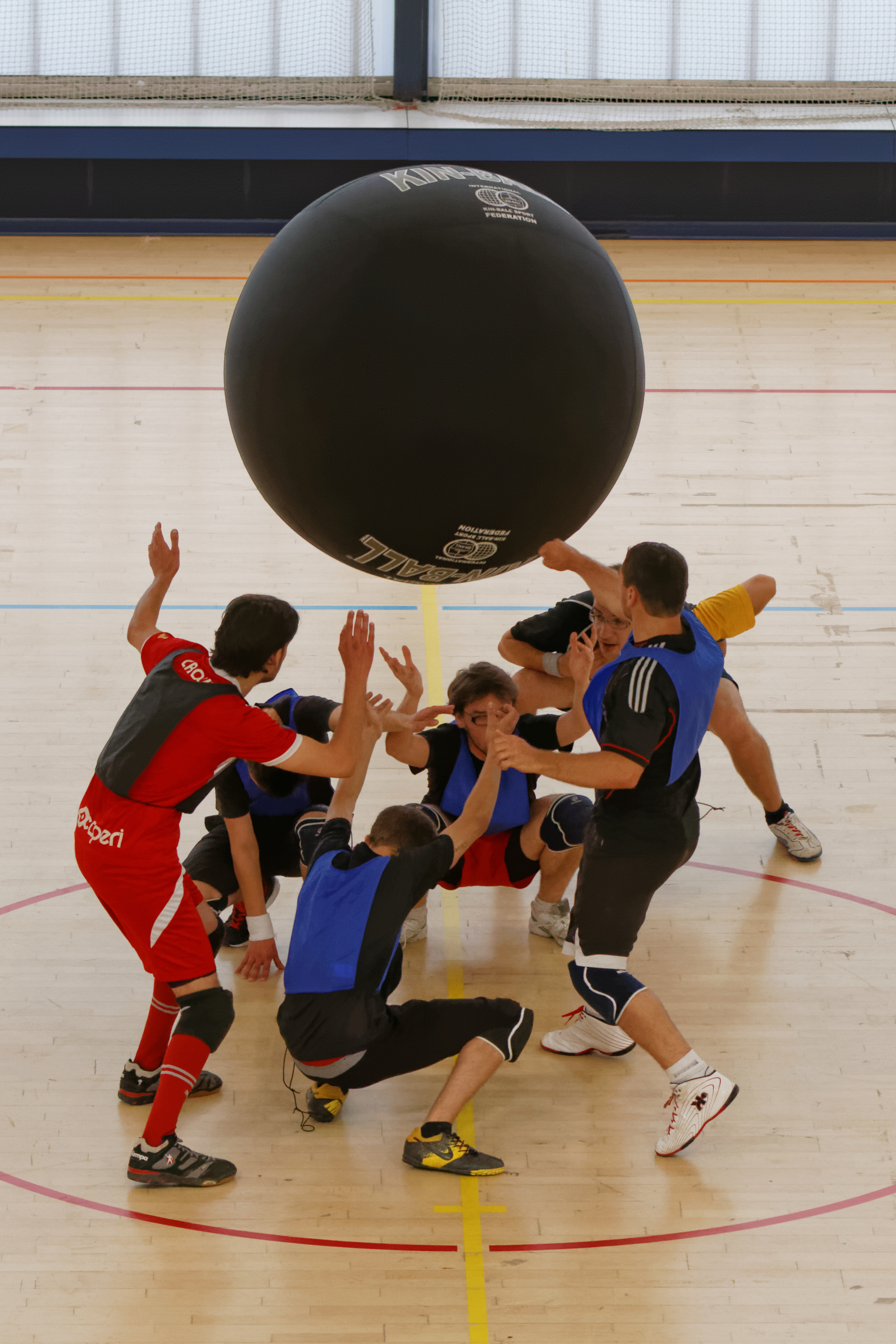 20e journée du championnat de France 2013-2014 de Kin-Ball, 8 juin 2014, Gymnase George Carpentier, Paris.